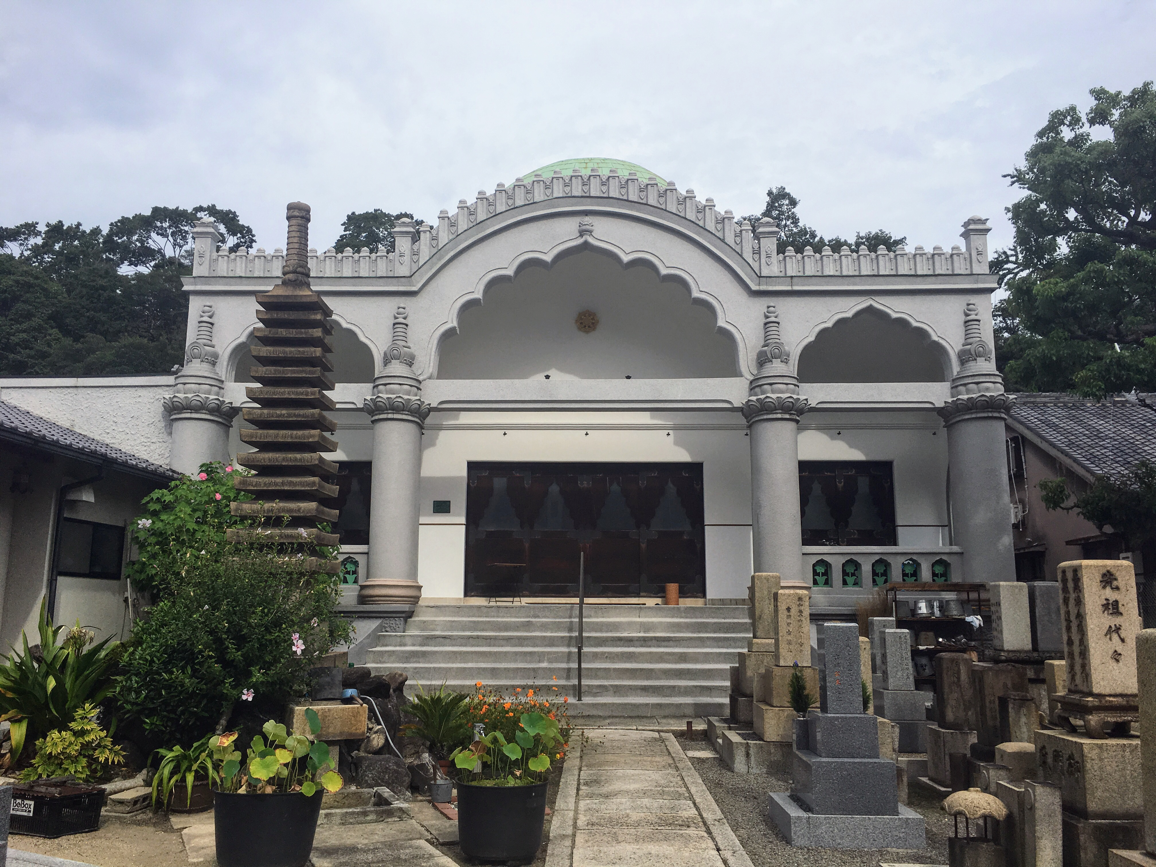 2019年8月22日、心光寺で撮影。